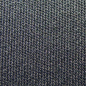 modern mouse surface